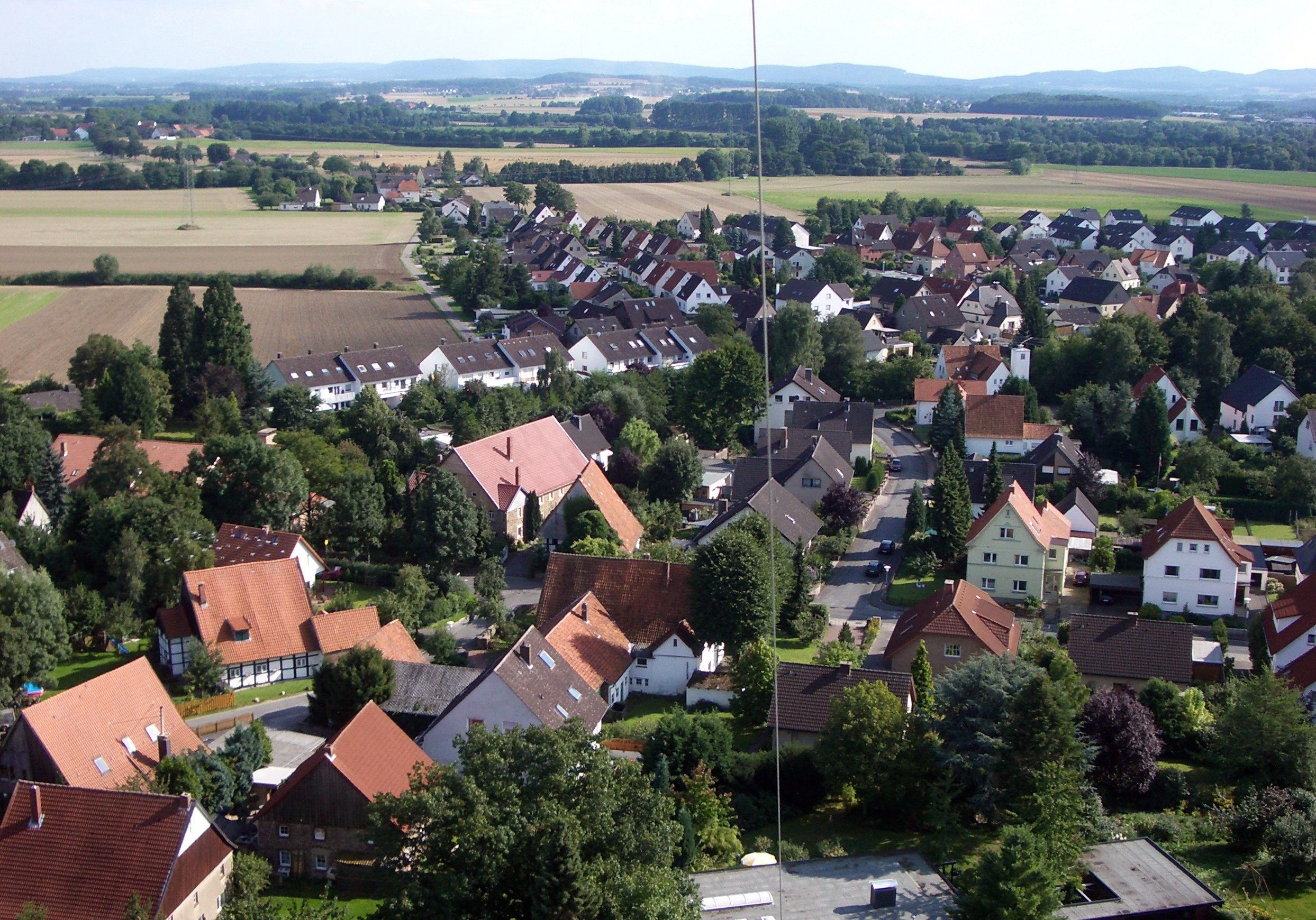 Ortsteil Ehrsen der Stadt Bad Salzuflen im Kreis Lippe. Das Luftbild wurde mit Hilfe eines Drachens gemacht, der die Kamera in die Höhe gezogen hat.